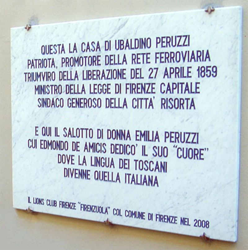 Lapide posta nel Marzo 2008 sul Palazzo Peruzzi in Borgo dei Greci a Firenze